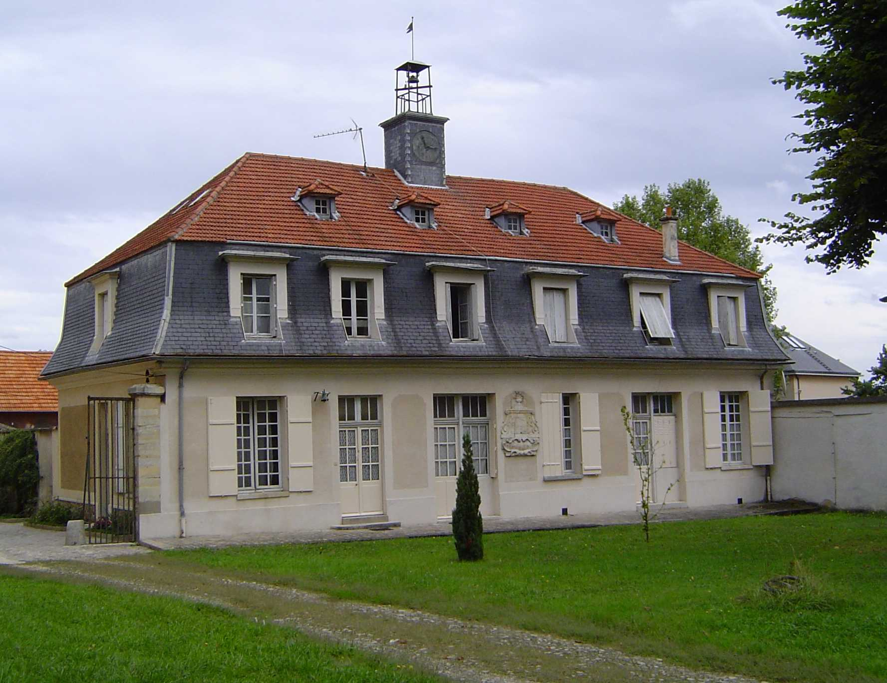 Photo d'un des bâtiments de la Manufacture des cires à Antony, Hauts-de-Seine, France. Je suis l'auteur de cette photo, prise le 24 septembre 2006.